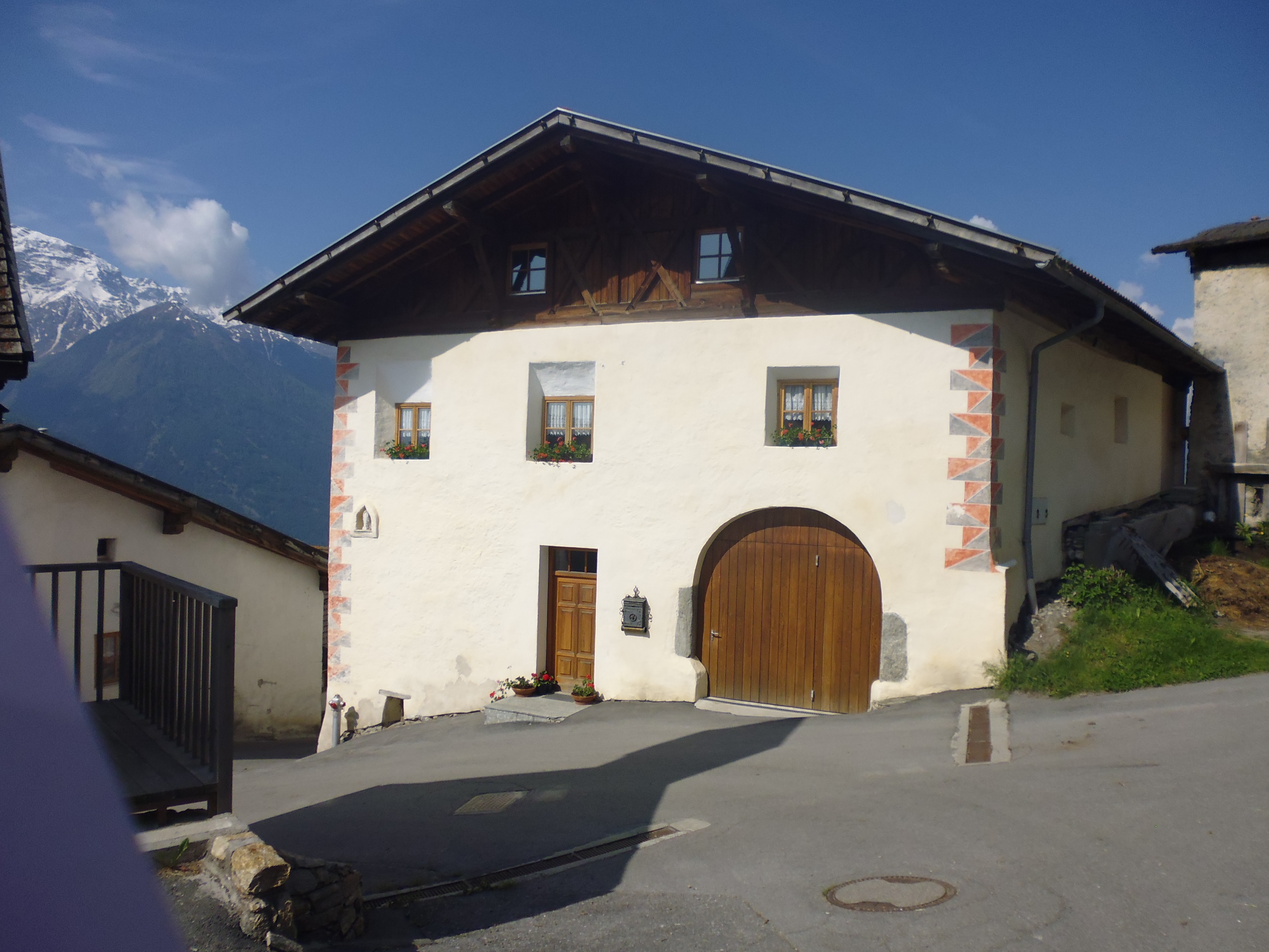 Haus Röder in Tanas